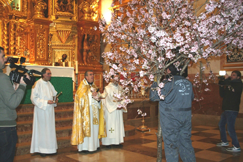 El rector de este templo bendice la rama y se ofrecen unas ramas a la Virgen del Rosario